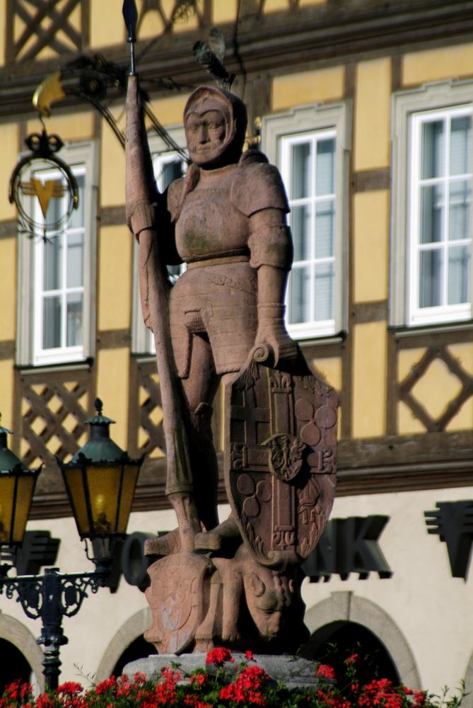 Sogenannter Milchlings-Brunnen auf dem Marktplatz mit einer Statue von Wolfgang Schutzbar (genannt Milchling)